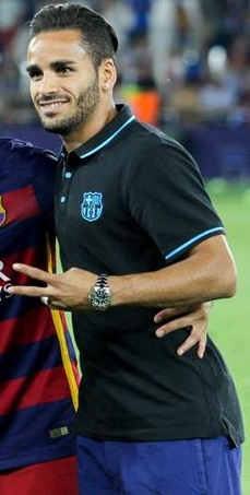 Douglas Pereira dos Santos en 2015.